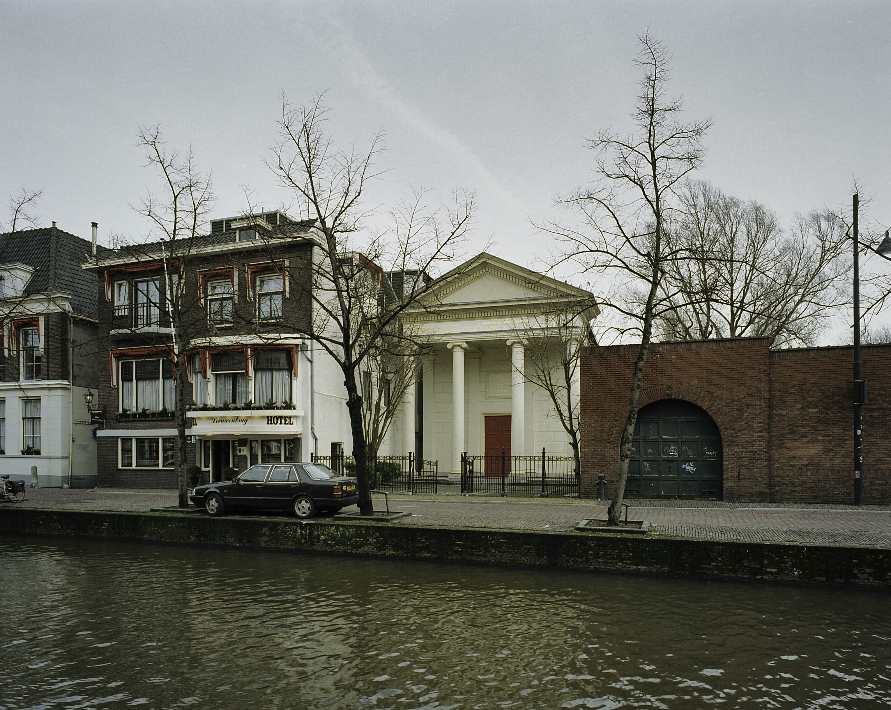 Voormalige synagoge: Voorzijde van de voormalige synagoge te Delft, gezien vanaf het water (opmerking: Gefotografeerd voor Monumenten In Nederland Zuid-Holland)